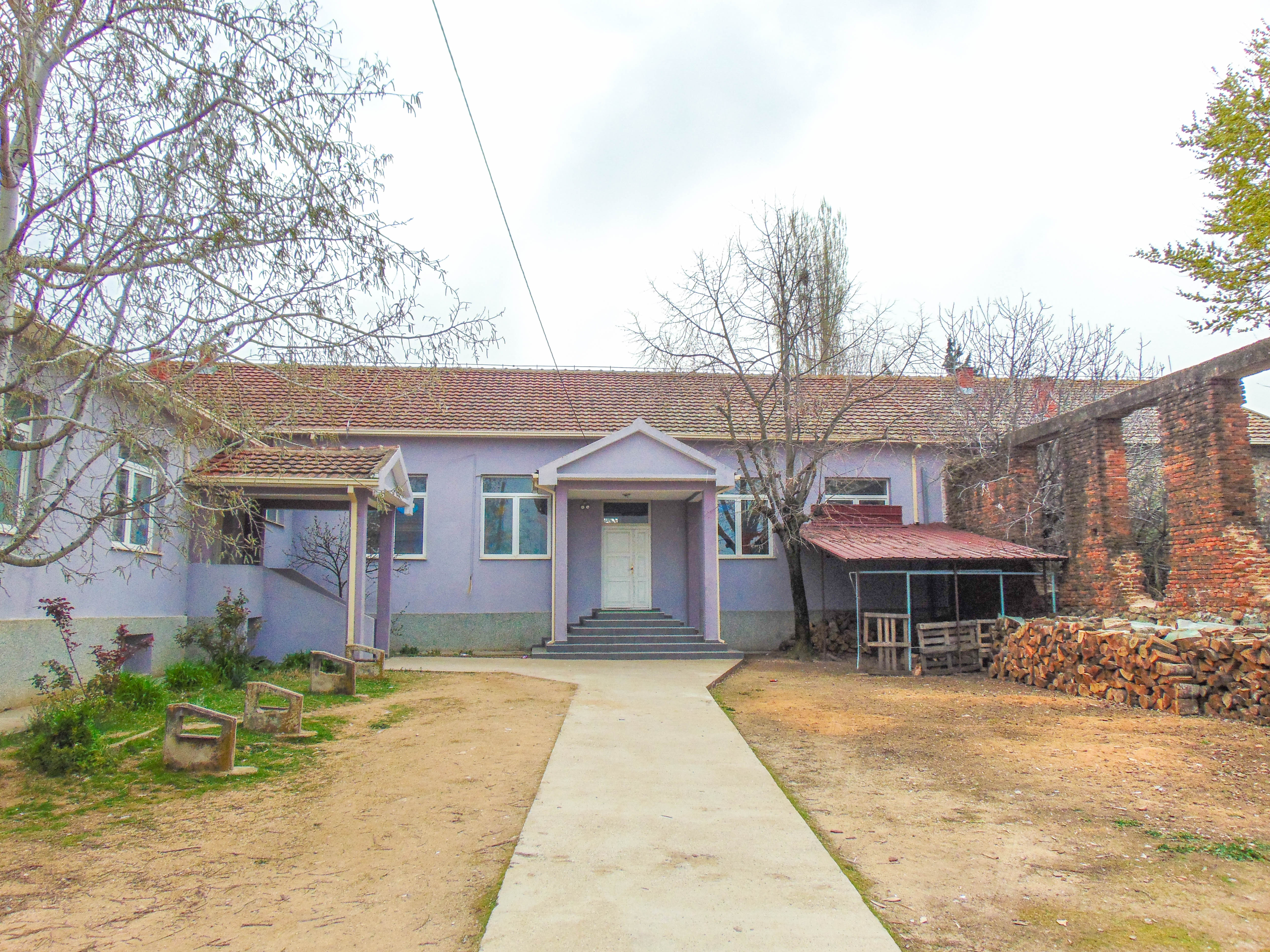 ОУ „Мануш Турновски“ - Сушево